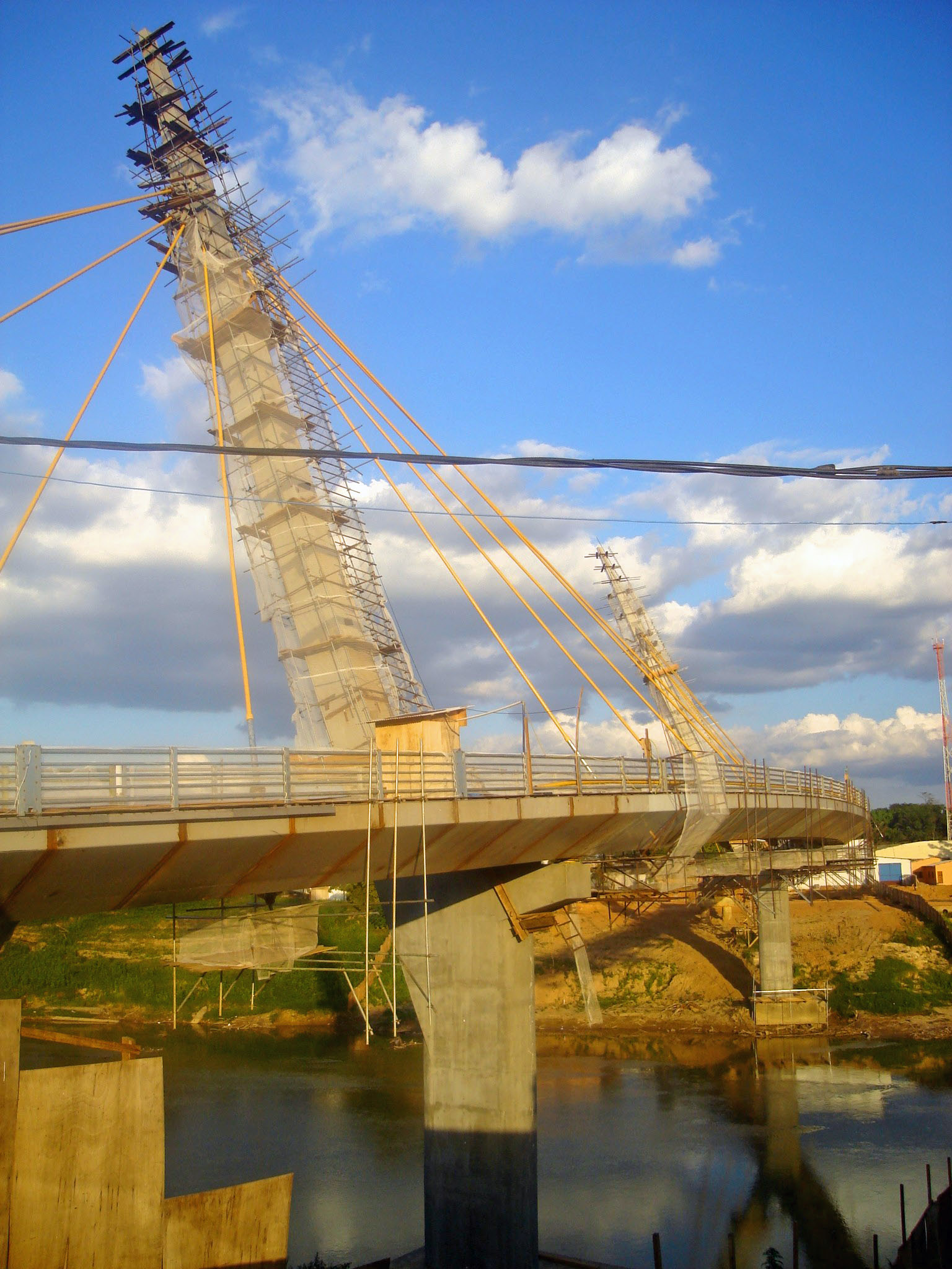 Passarela Joaquim Macedo under construction, Rio Branco, Acre, Brazil.